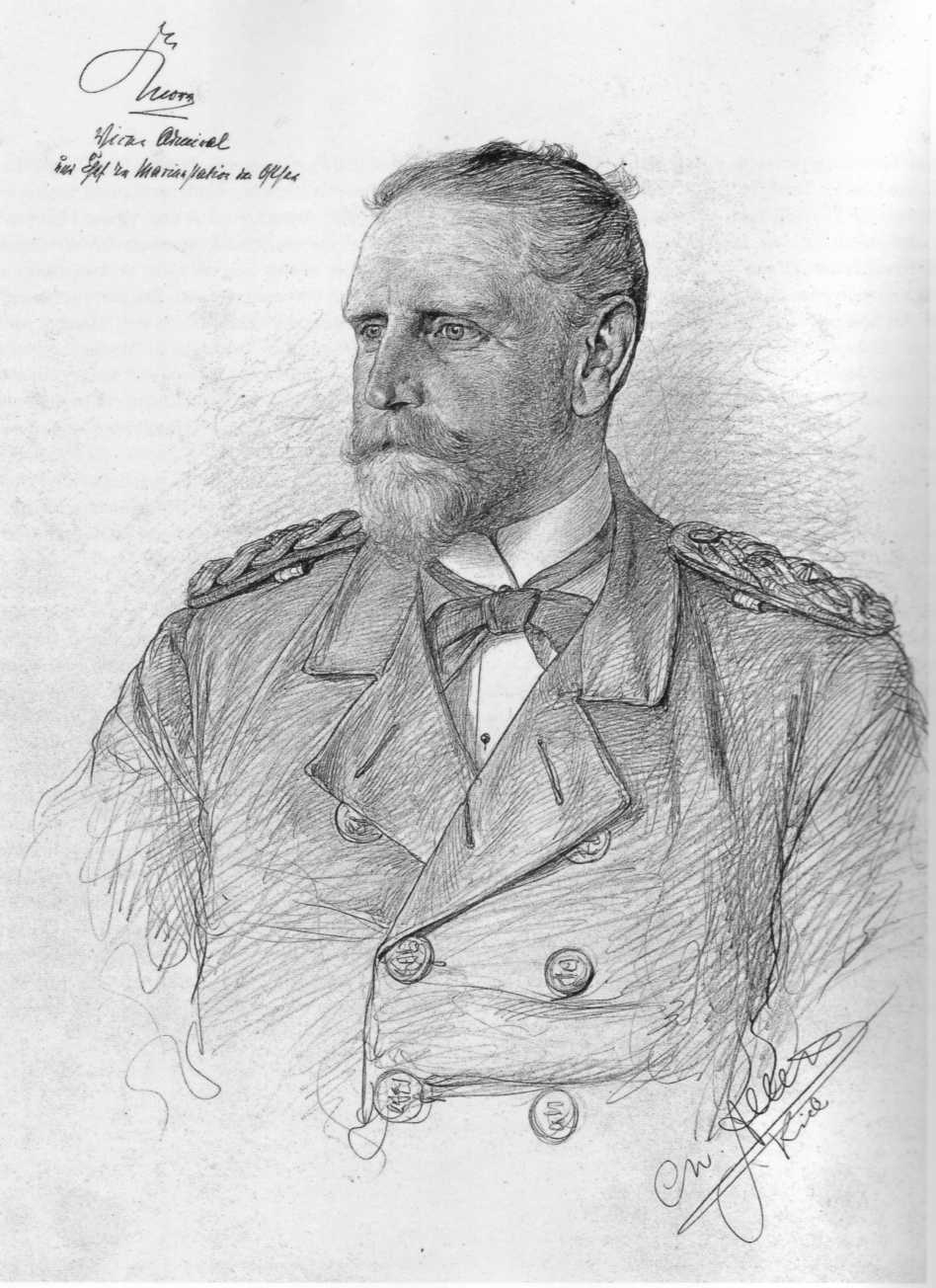 Eduard von Knorr, Zeichnung von Christian Wilhelm Allers (1857-1915).